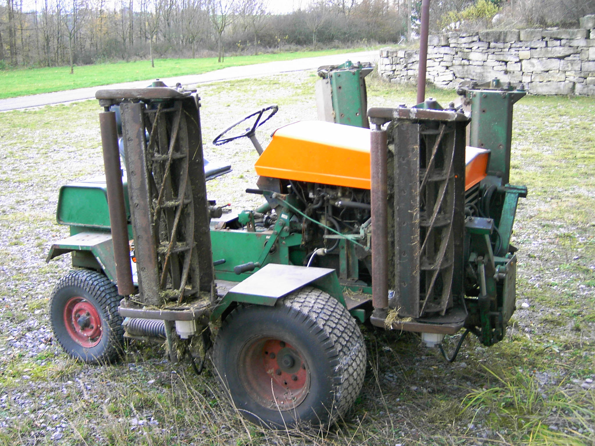 Aufsitz-Spindelmäher von Ransomes, Aufsitzrasenmäher, Rasentraktor